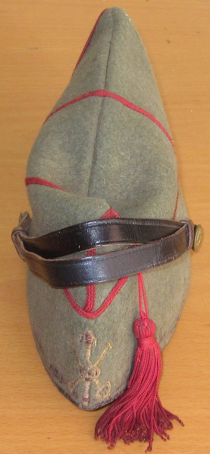 Chapirí. Gorra tradicional de la legió espanyola fins 2011. Exemplar de circa 1990